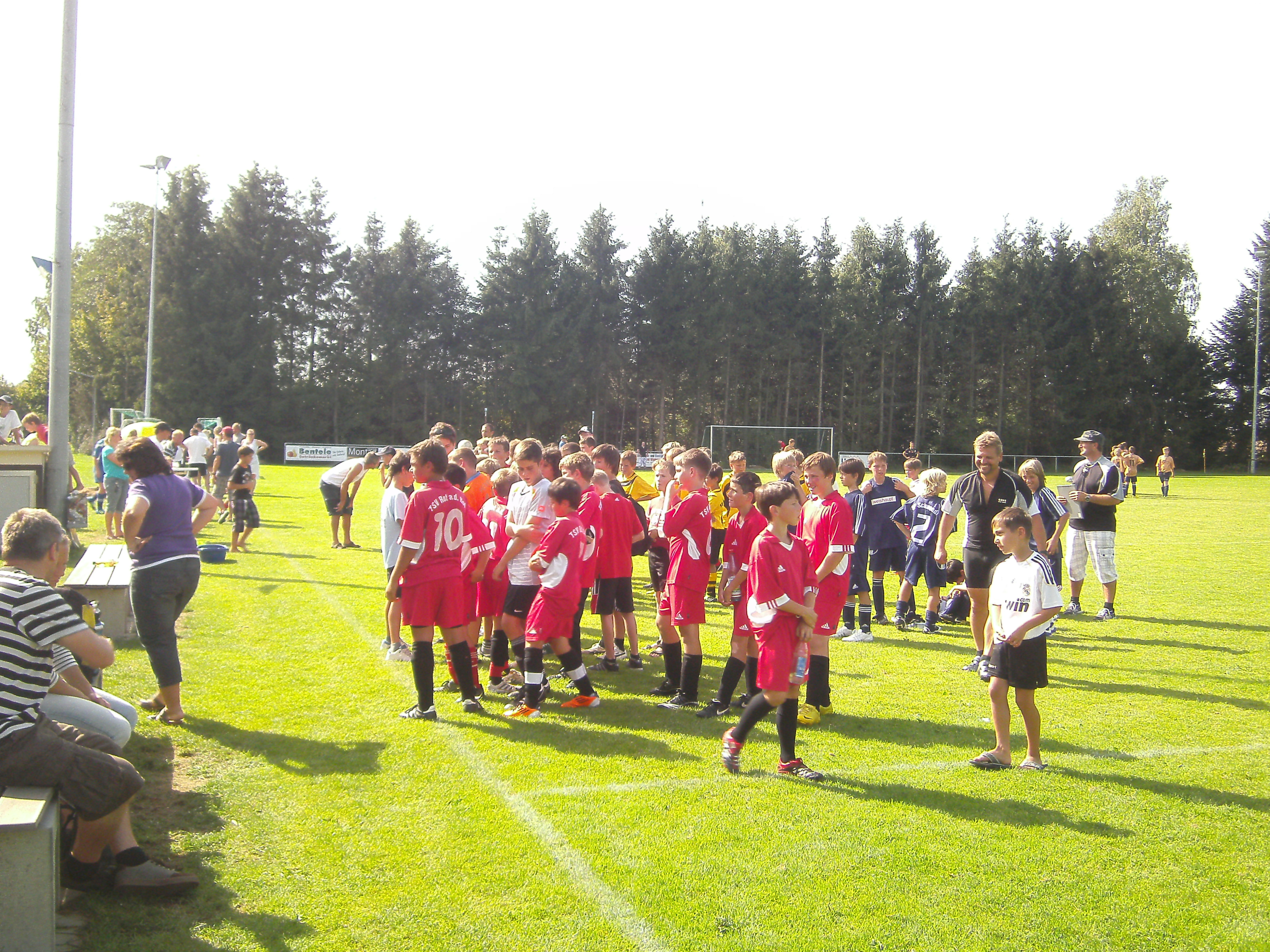 D-Jugend TSV Rot an der Rot 1890 bei einem Turnier in Bellamont einem Teilort von Steinhausen an der Rottum